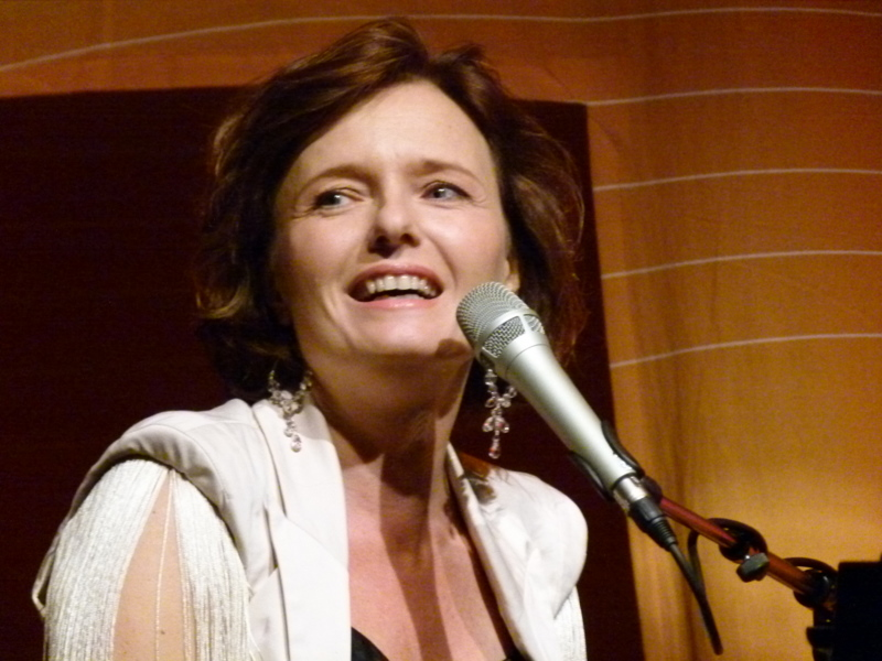 Ingrid Bjørnov norsk artist